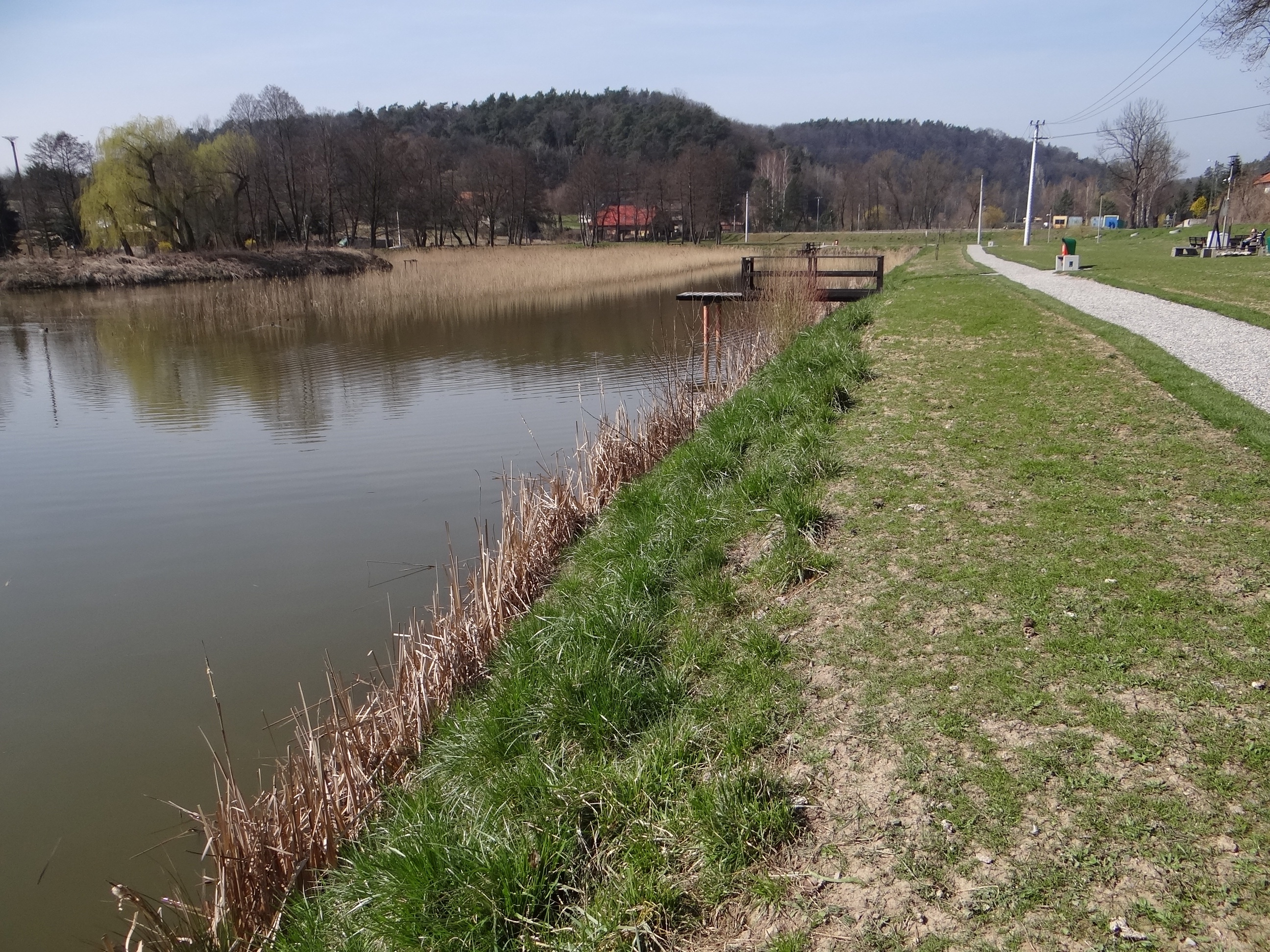 Staw w Aleksandrowicach